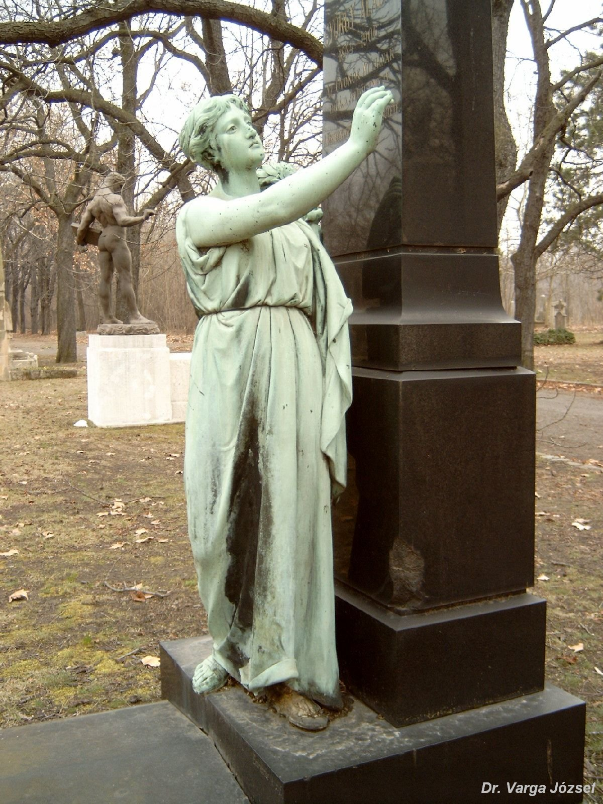 György Aladár (Huszt, 1855. április 11. – Budapest, 1906. január 16.): író, újságíró, kultúrpolitikus sírja Budapesten. Kerepesi temető: 29/1-2-26.